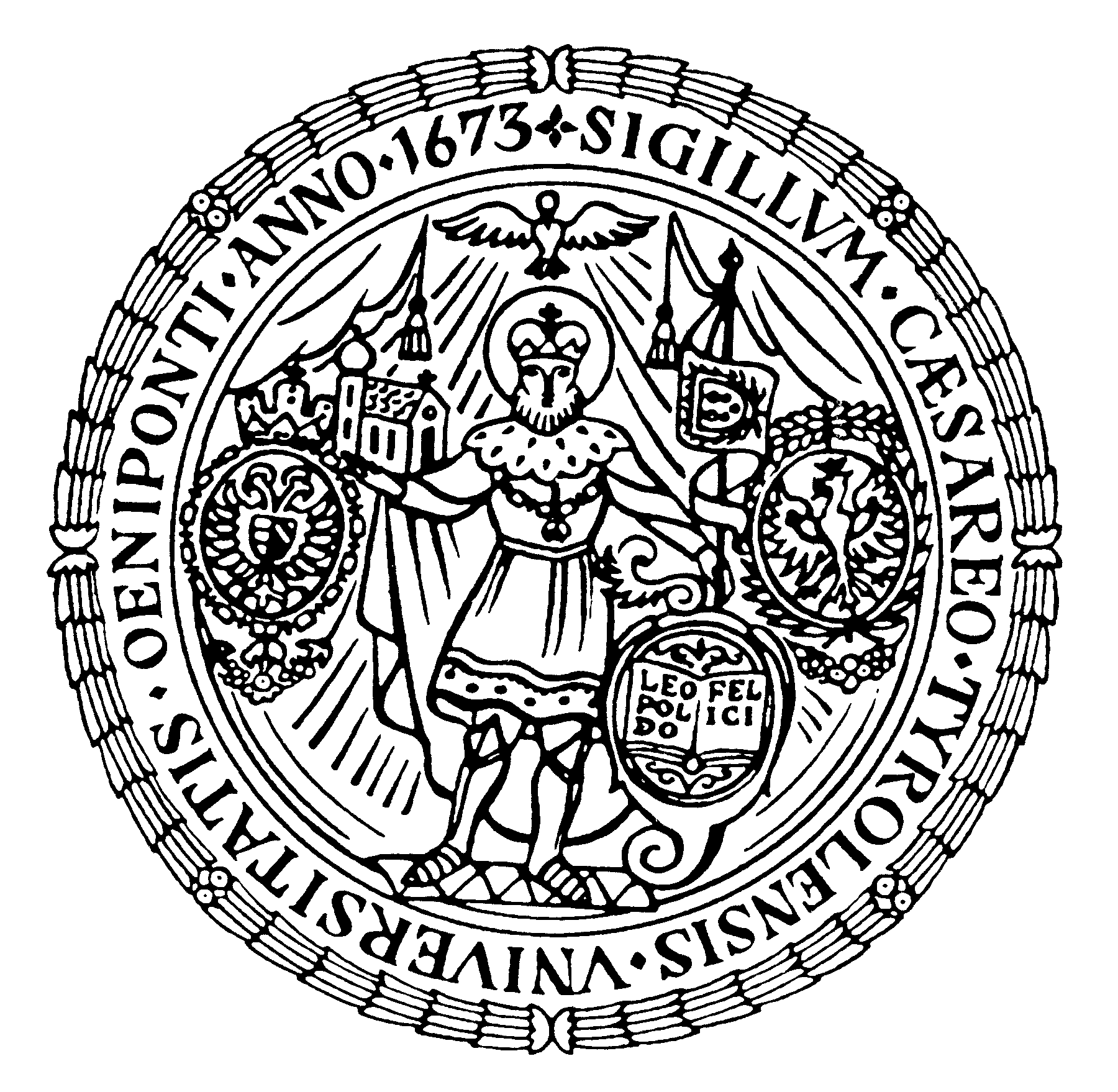 Siegel der Leopold-Franzens-Universität Innsbruck verliehen durch Kaiser Leopold I.